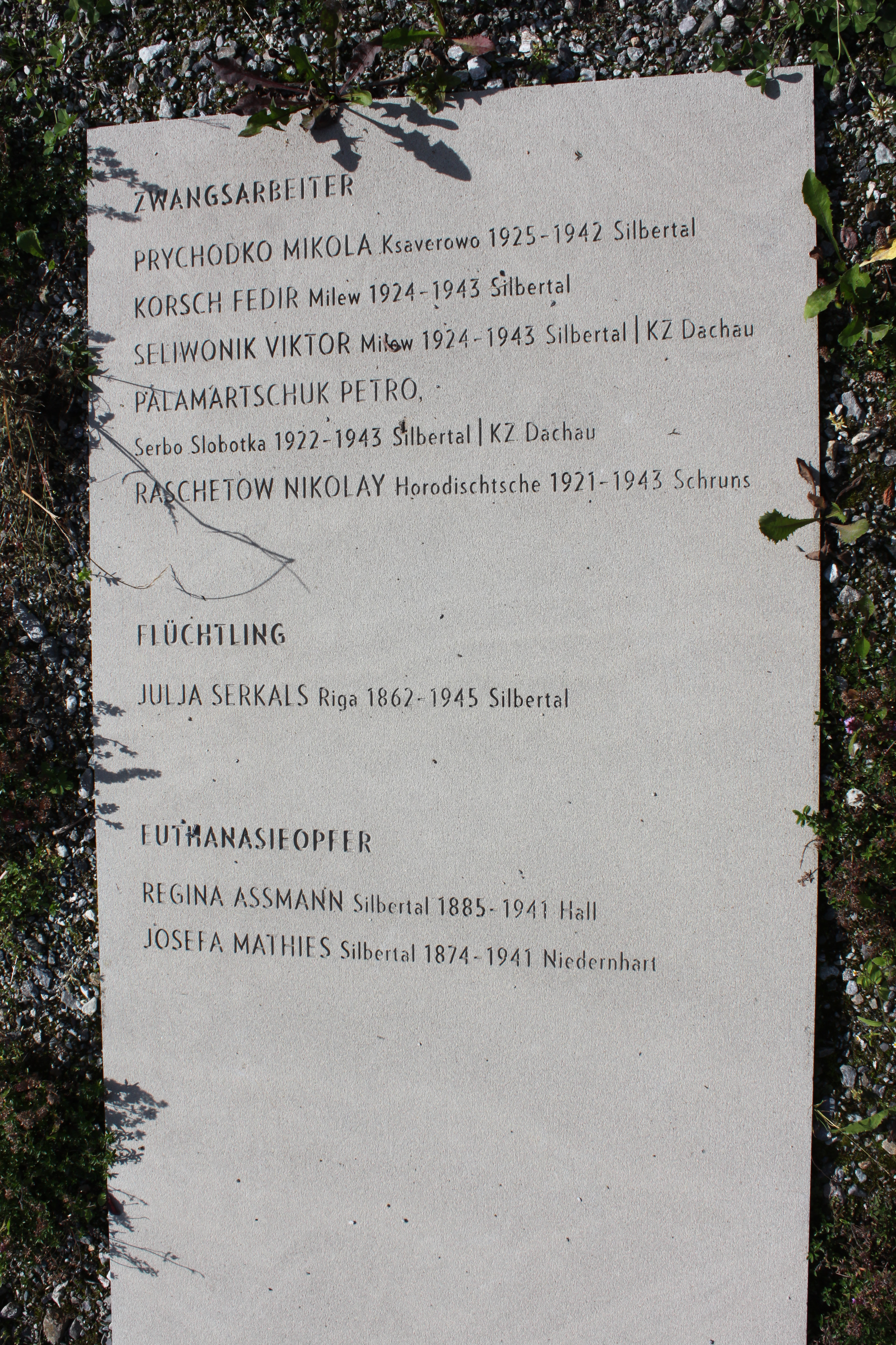 Zwangsarbeiter Flüchtling Euthanasieopfer, eine beschriftete Steinplatte, neues Kriegerdenkmal Silbertal 2010